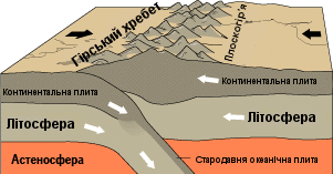 Колізія континентів. Переклад